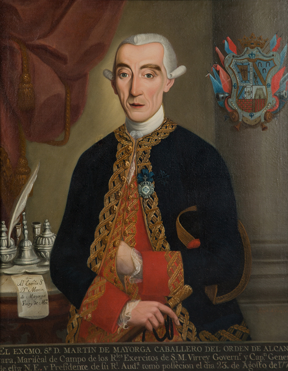 Martin de Mayorga, viceroy